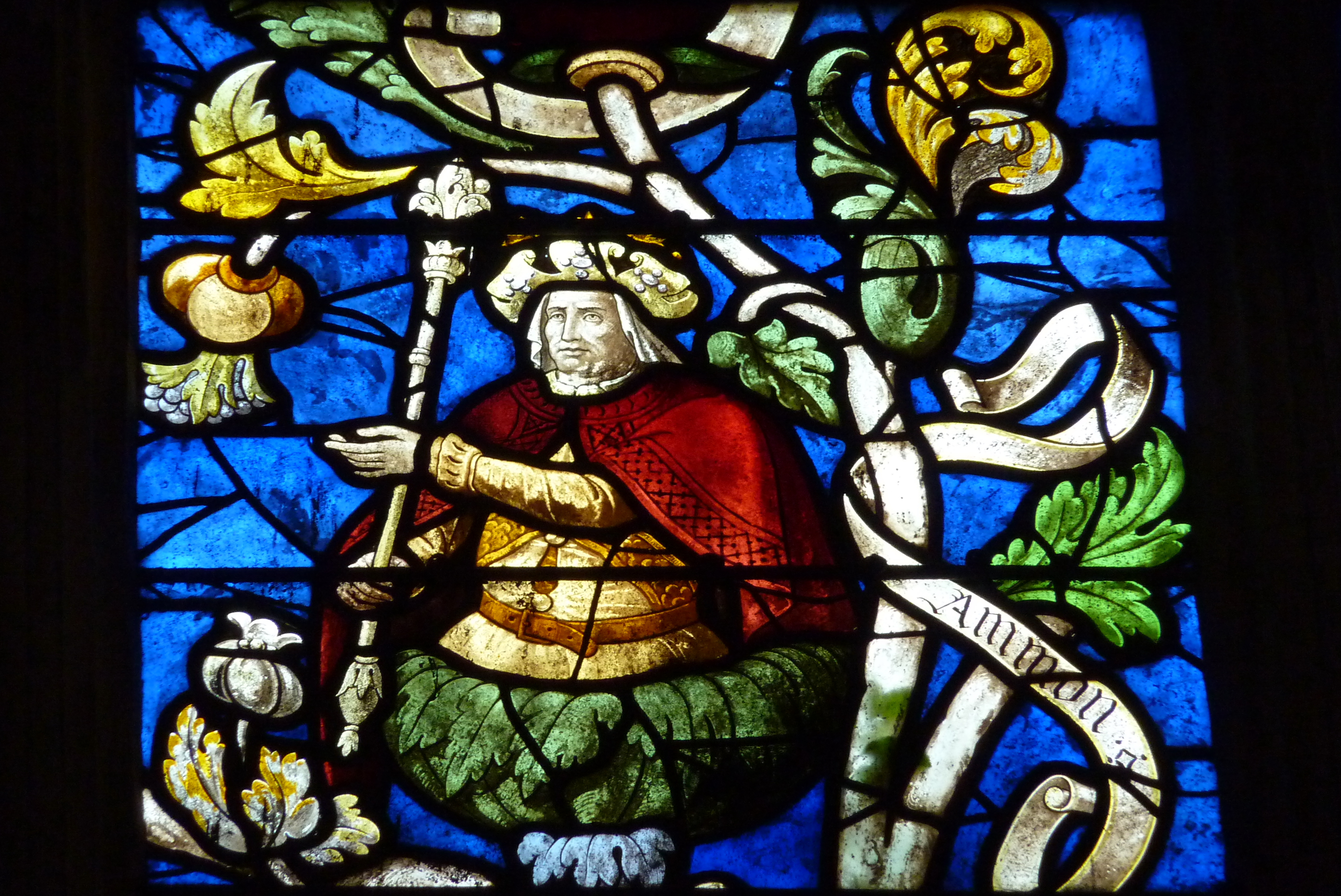 Katholische Pfarrkirche Saint-Martin in Herblay, einer Gemeinde im Département Val d'Oise (Île de France), Bleiglasfenster aus dem 16. Jh. mit der Darstellung der Wurzel Jesse, Ausschnitt: König Amon